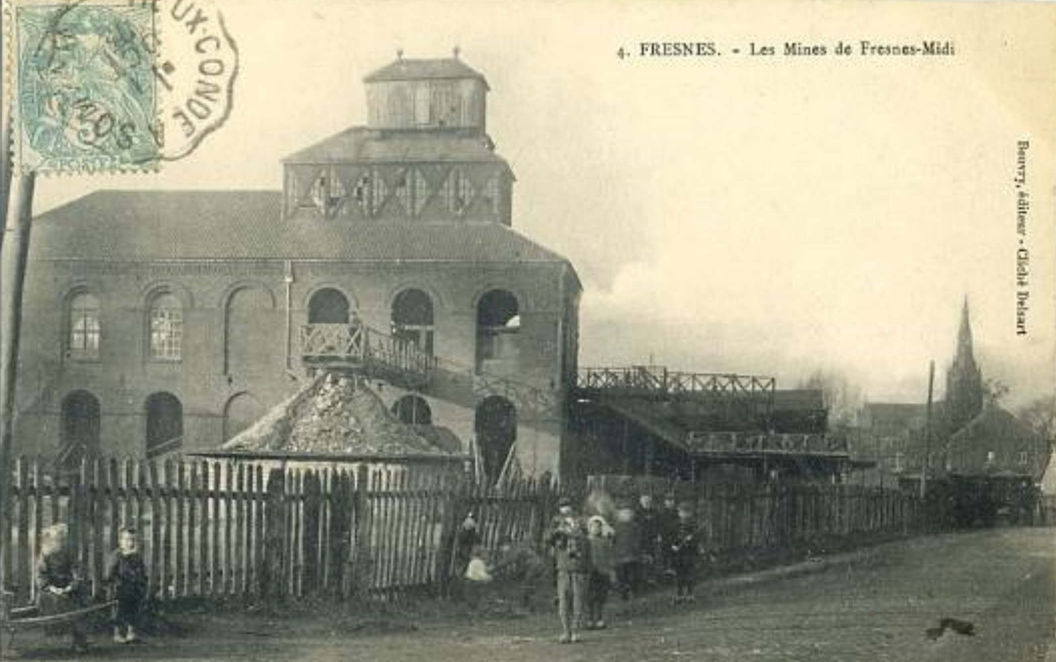 La Fosse Soult n° 1 de la Compagnie des mines de Thivencelle était un charbonnage constitué d'un seul puits situé à Fresnes-sur-Escaut, Nord, Nord-Pas-de-Calais, France.